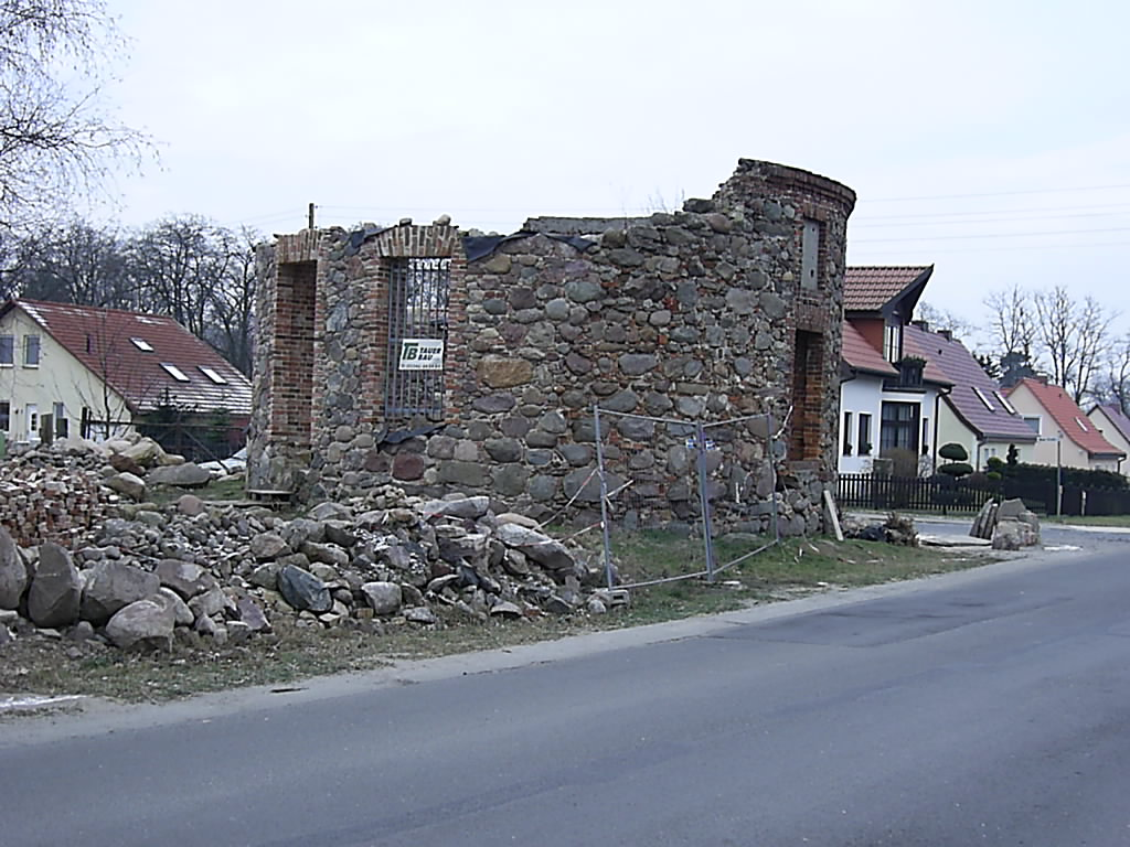 batch: Bismarckturm Frankfurt/Oder